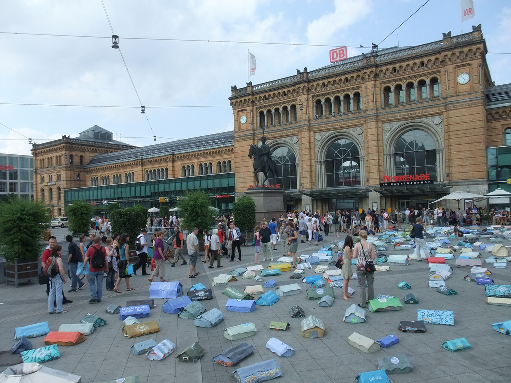 Kunstaktion von Hermann Josef Hack mit 600 kleinen Klimaflüchtlingszelten vor dem hannoverschen Hauptbahnhof